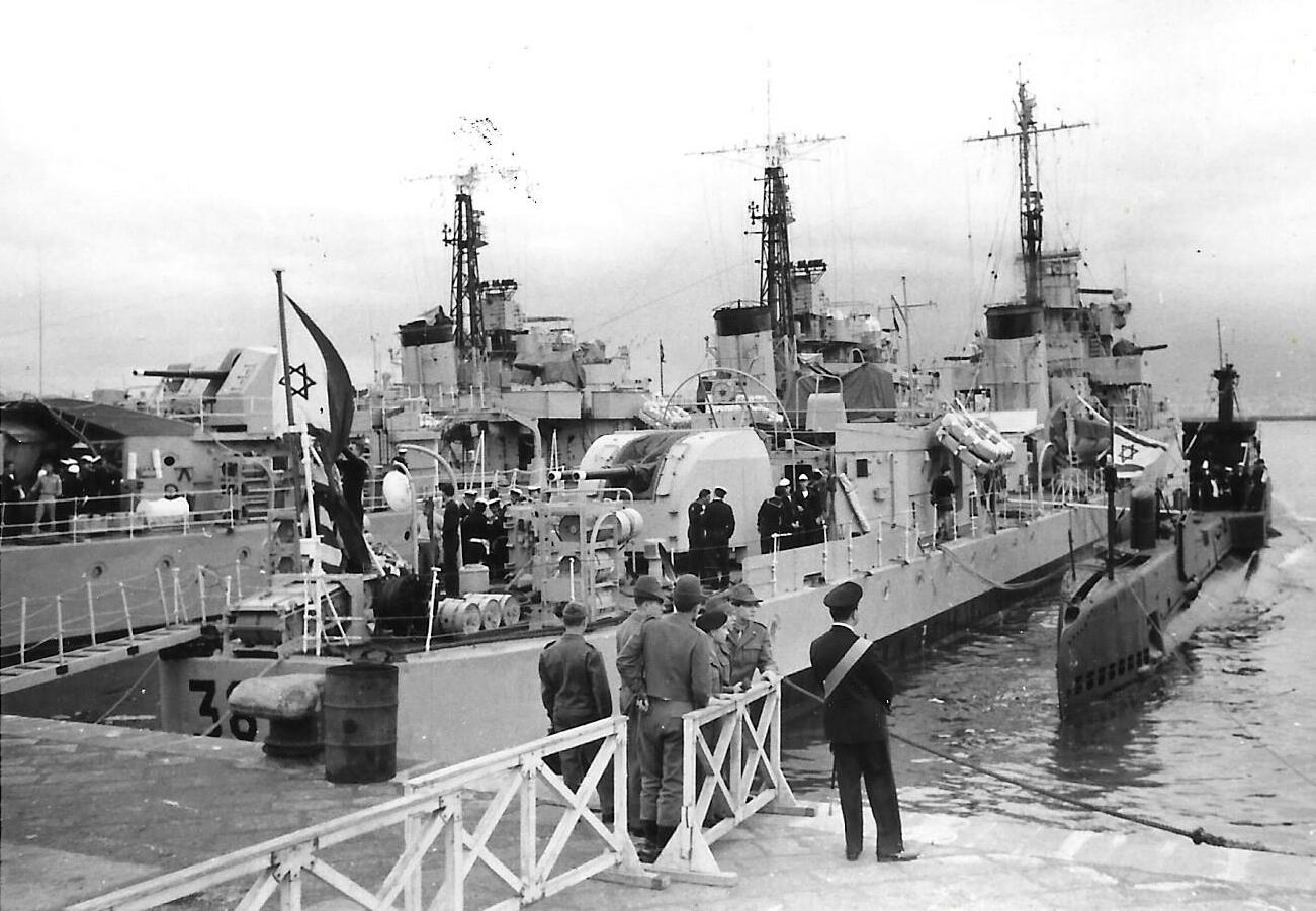 ביקור שייטת המשחתות והצוללת אח"י רהב (צ-73) בנמל נפולי